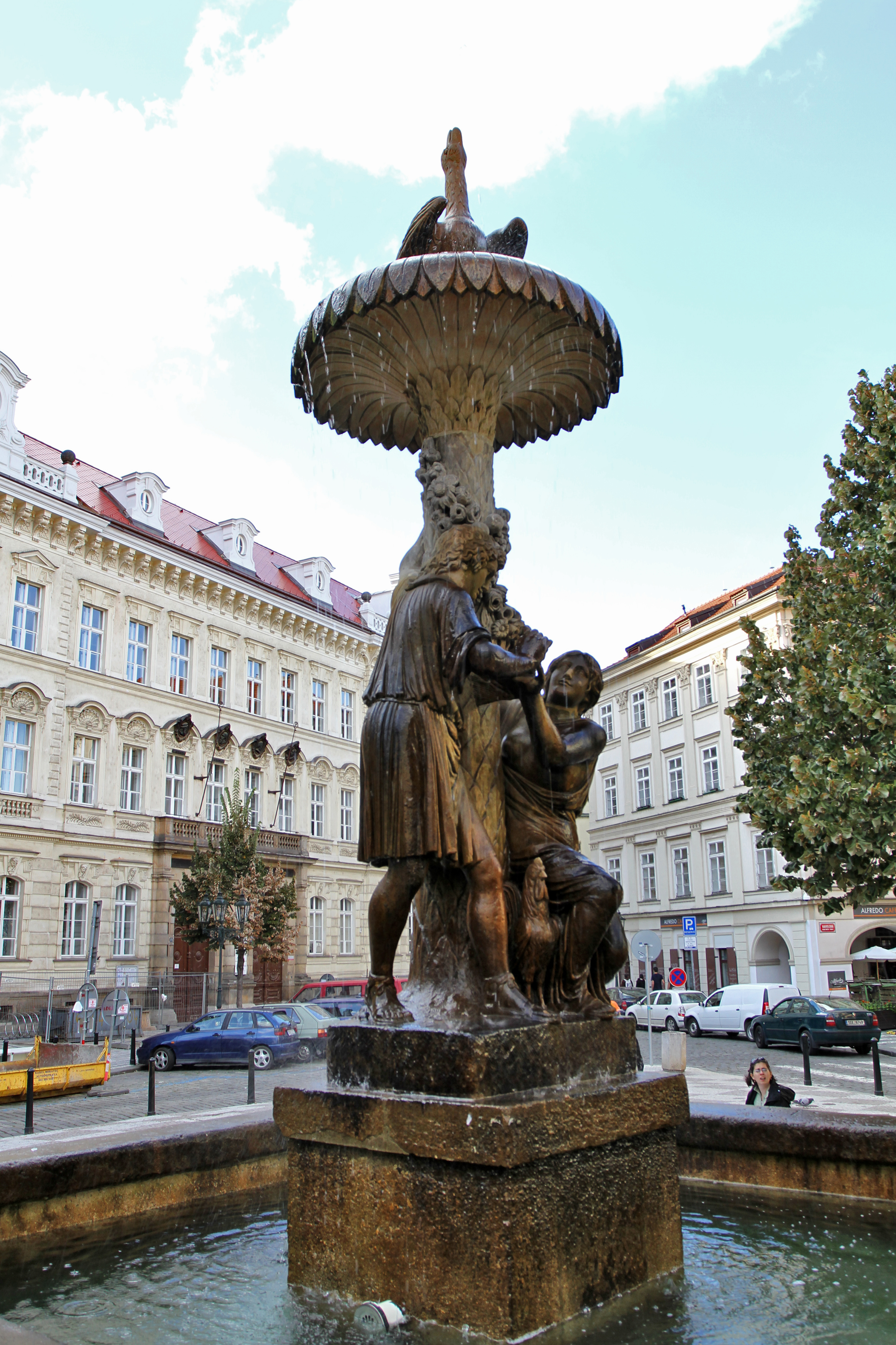 Kašna Wimmerova (Staré Město), Praha 1, Uhelný trh, Staré Město